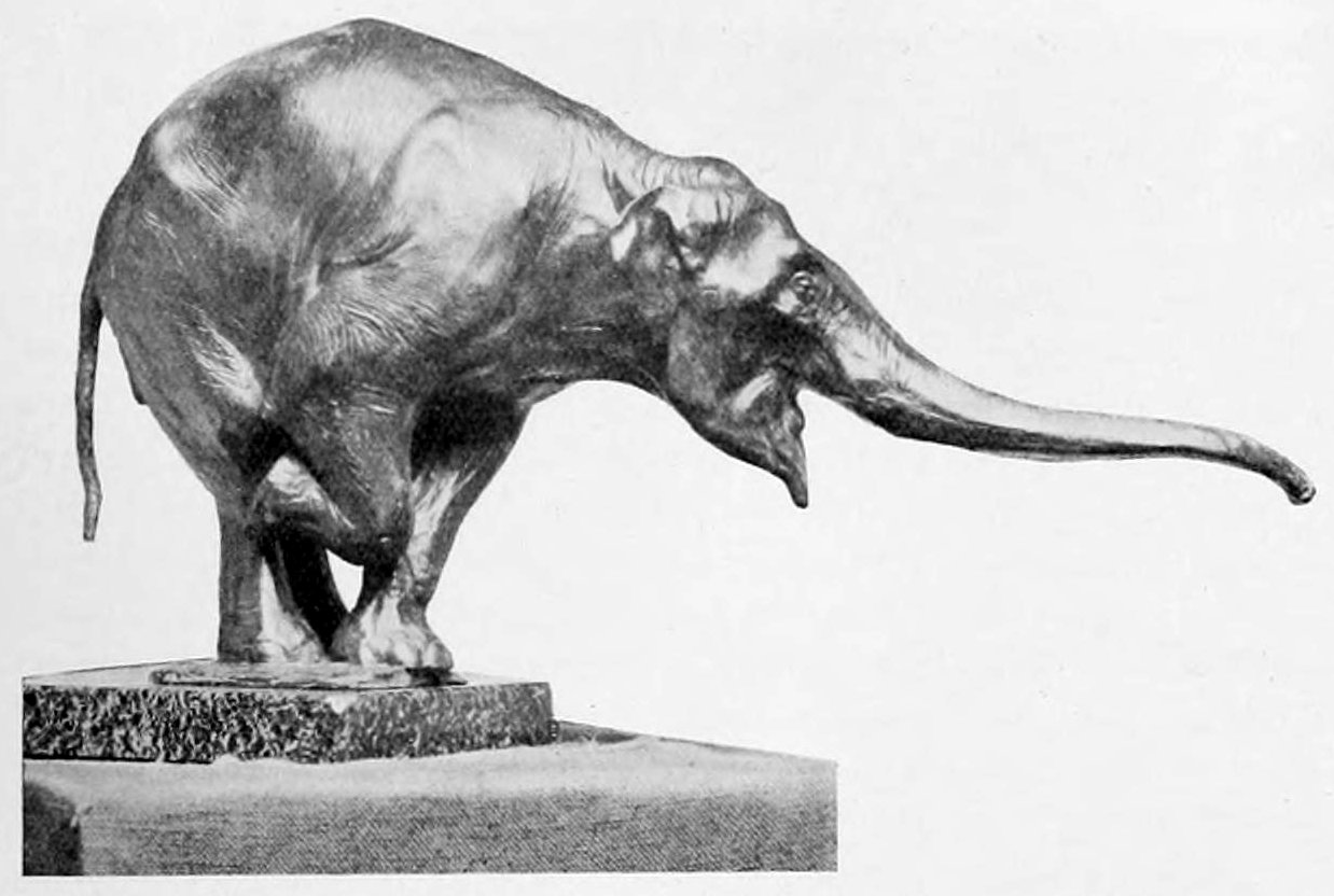 Éléphant d'Asie "mendiant"sculpture en bronze, fonte à la cire perdue A.A.Hébrard , édition originale